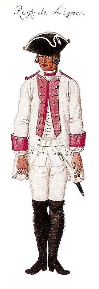 Kaiserliches Infanterieregiment Ligne 1762 (1769: No. 38)